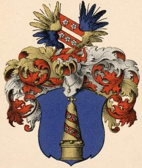 Strokirchi suguvõsa aadlivapp.